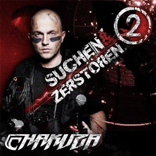 Cover des Albums "Suchen & Zerstören II"